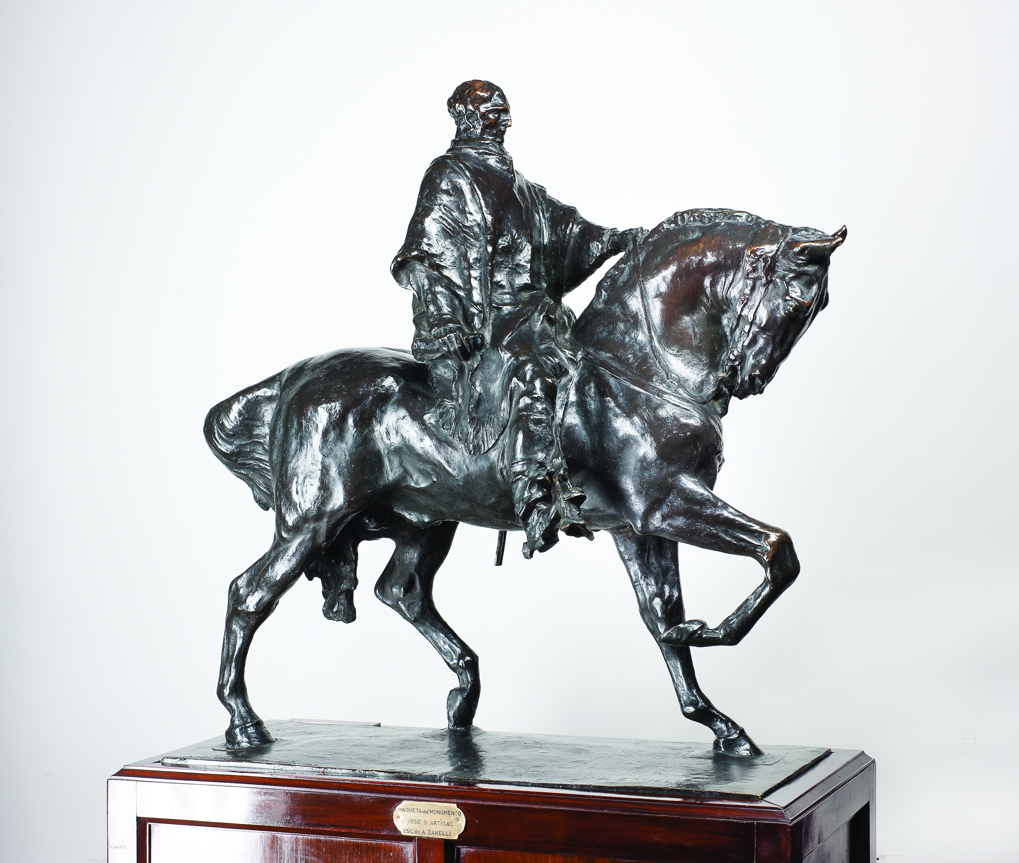 Archivo provisto por el Museo Histórico Nacional de Uruguay en el marco de un proyecto GLAM entre esa institución y Wikimedia Uruguay.